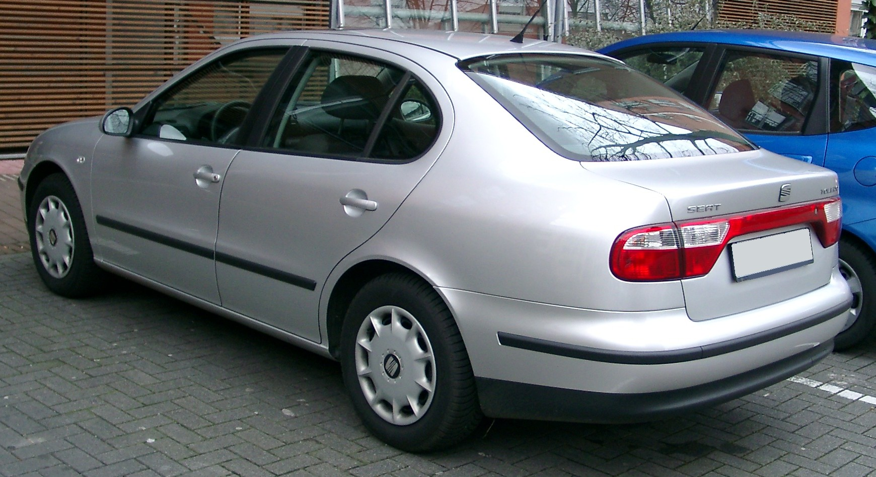 Seat Toledo, 2. Generation